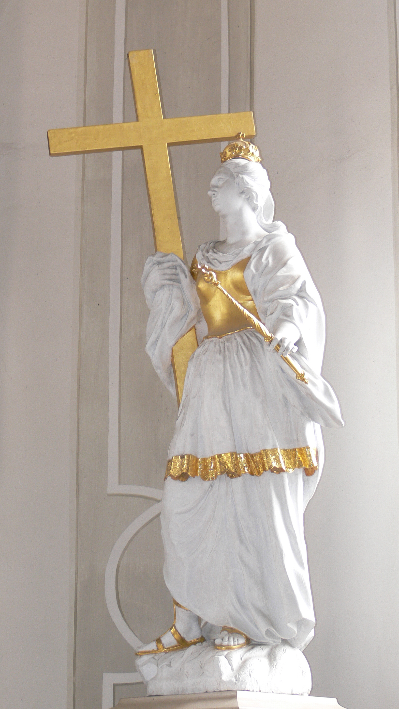 Stiftskirche Heilig Kreuz, Horb am Neckar Figur "Kaiserin Helena", um 1700